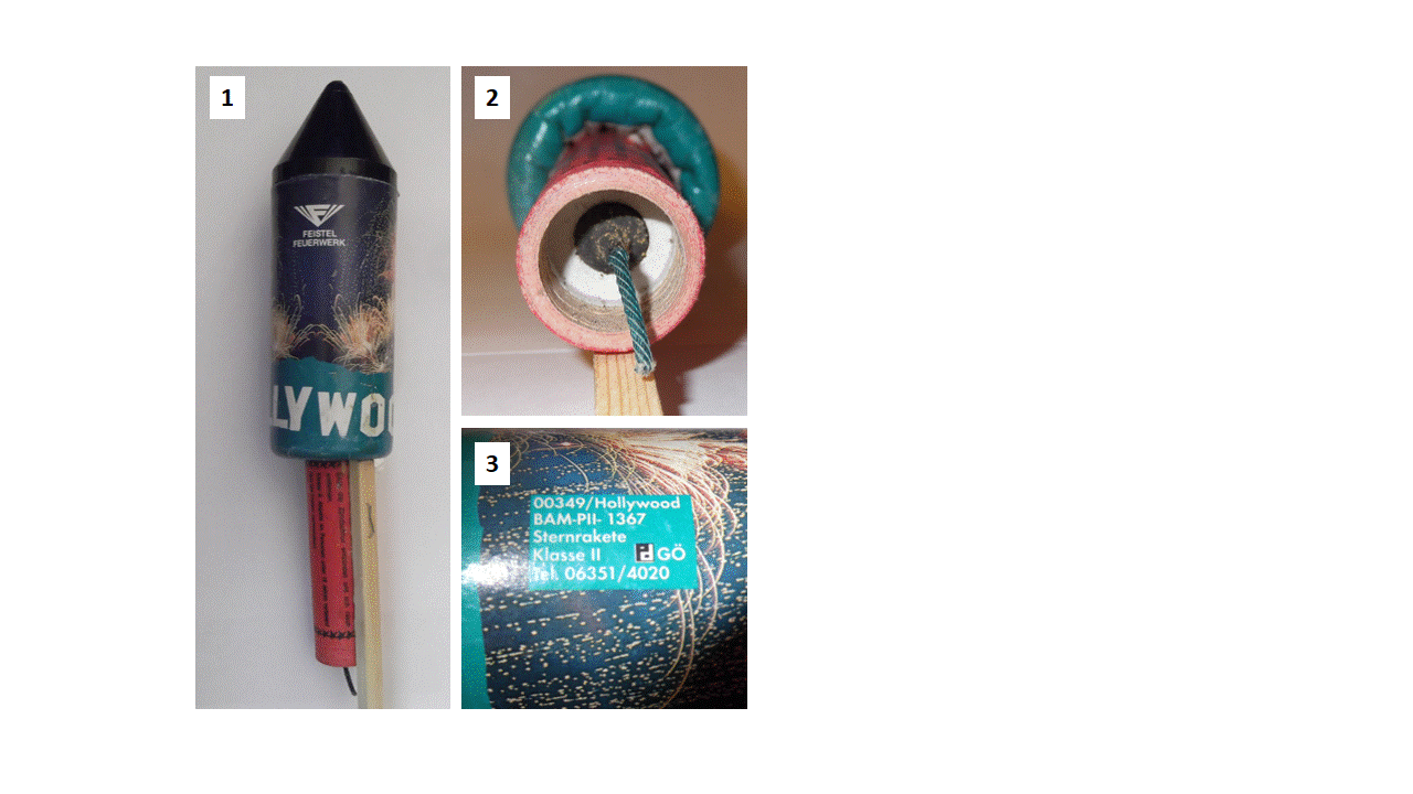 1: PPT-Feistel Sternrakete "Hollywood", 2: Raketenmotor ("Treiber") mit Schwarzpulver Anfeuerung und Klemmung aus Kaolin, 3: BAM-Zulassungsnummer und Herstellerkennzeichen